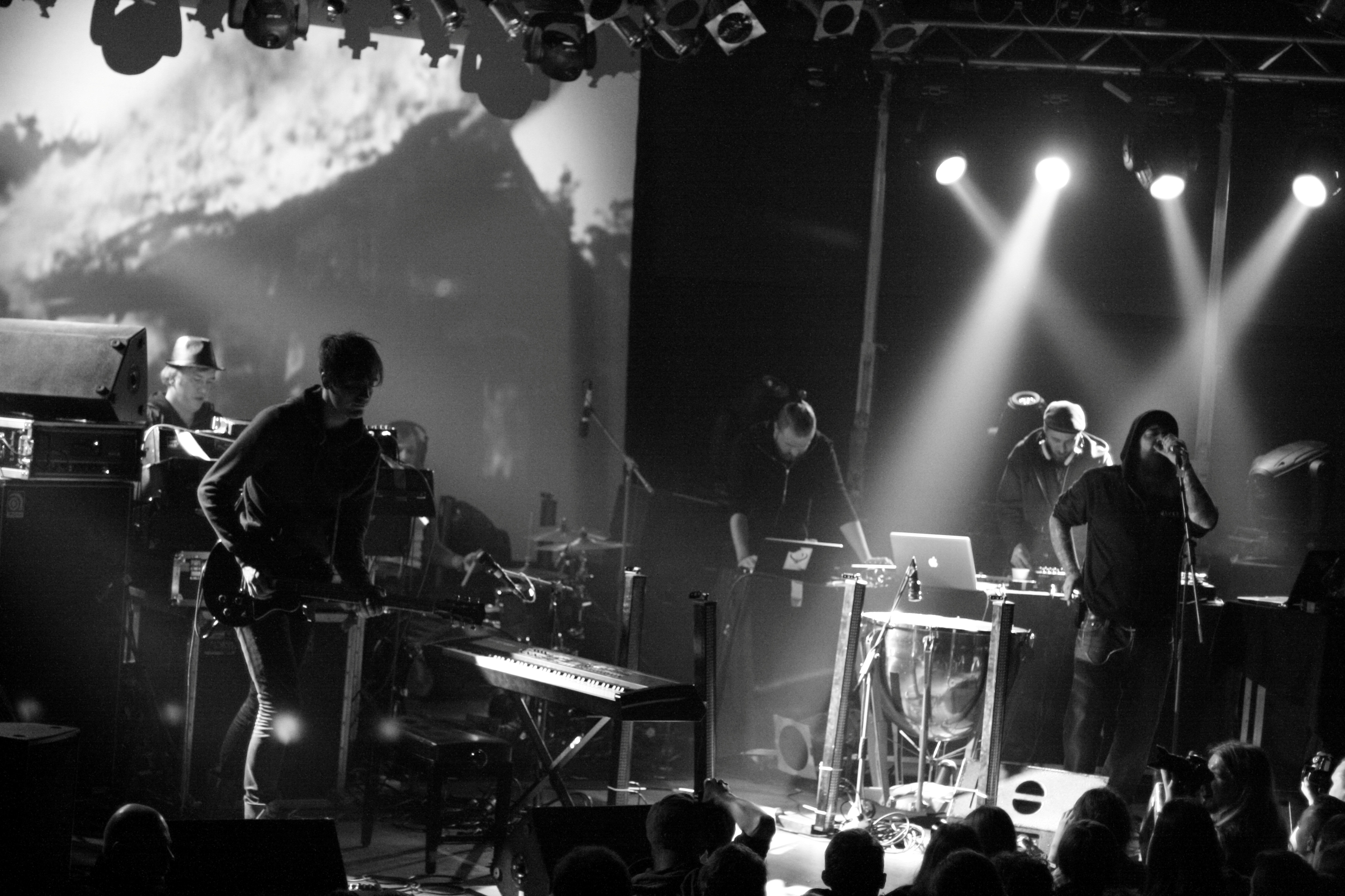 Zdjęcie zrobione w krakowskim KLUBIE STUDIO podczas koncertu